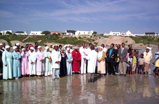 'Afrikaans: n Charismatiese doopdiens op die strand in Paternoster, Suid-Afrika